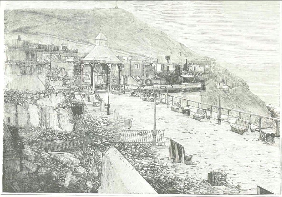 Chorrillos después de la batalla del 13 de enero. Malecón de Chorrillos.